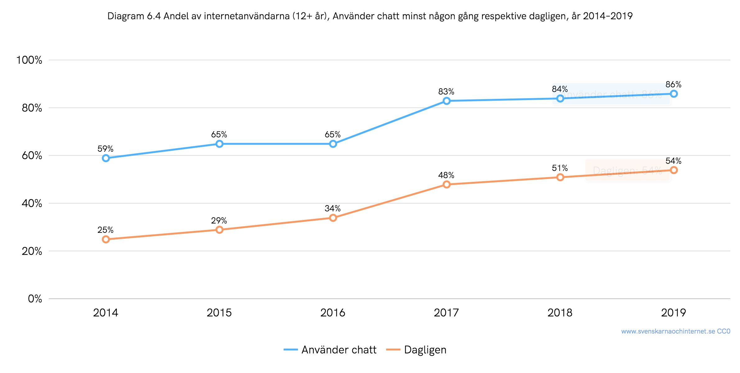 Andel av de svenska internetanvändarna (12+ år) som använde chatt någon gång respektive dagligen, år 2014–2019. Siffror från undersökningen "Svenskarna och internet".